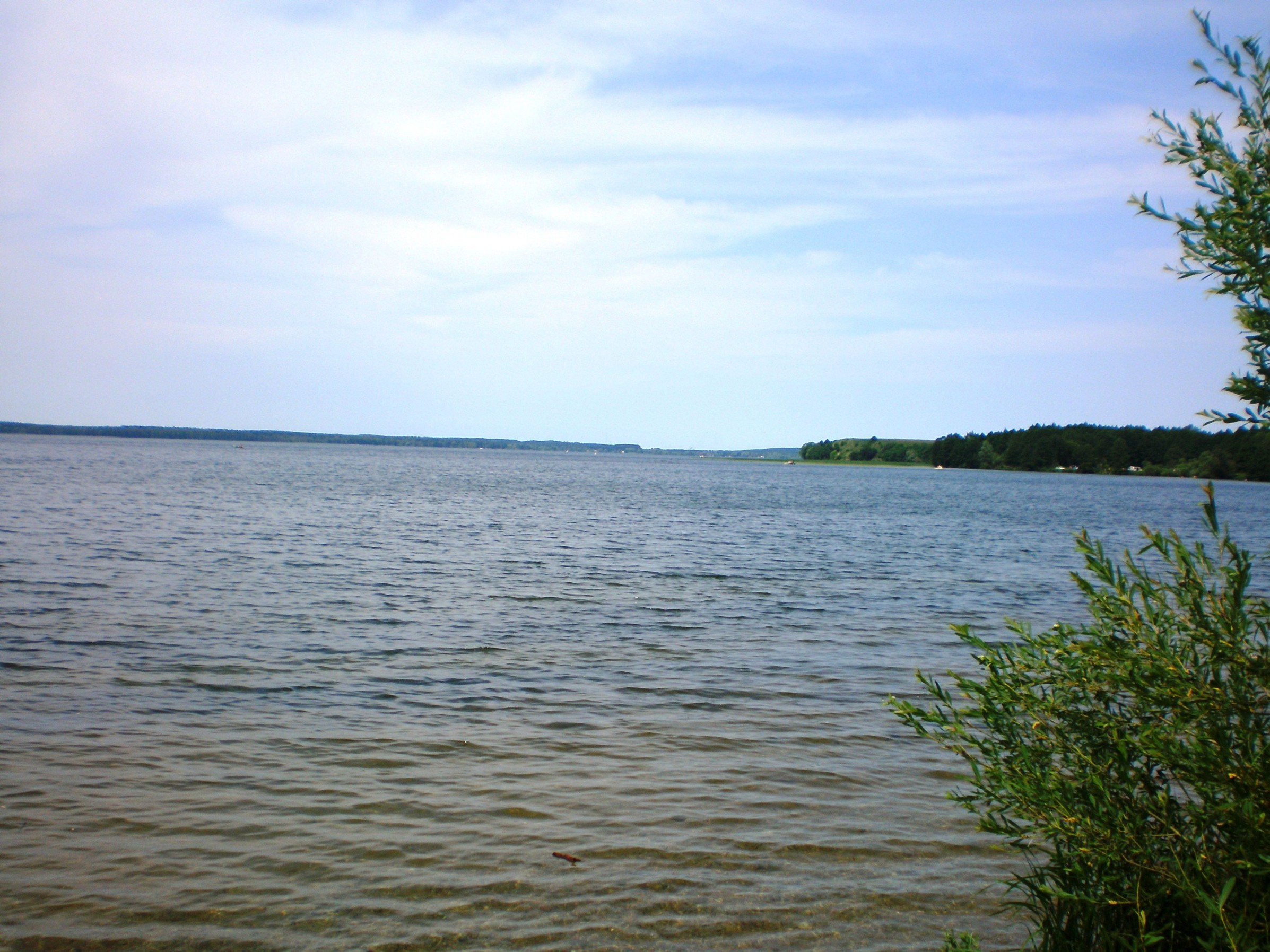 Vištyčio ežero rytinė pakrantė, Vilkaviškio raj.